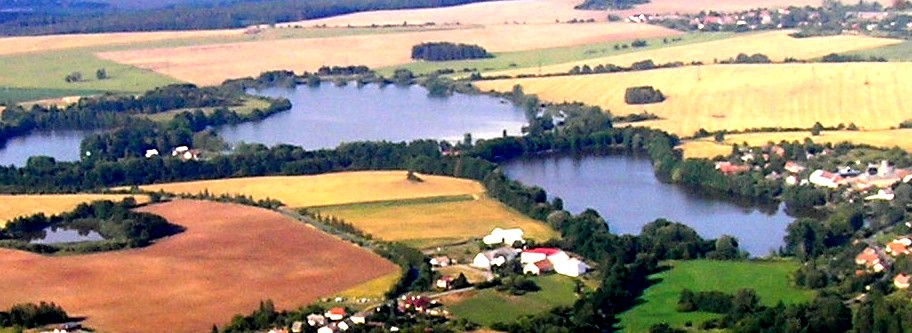 Letecký pohled na Havlovické rybníky